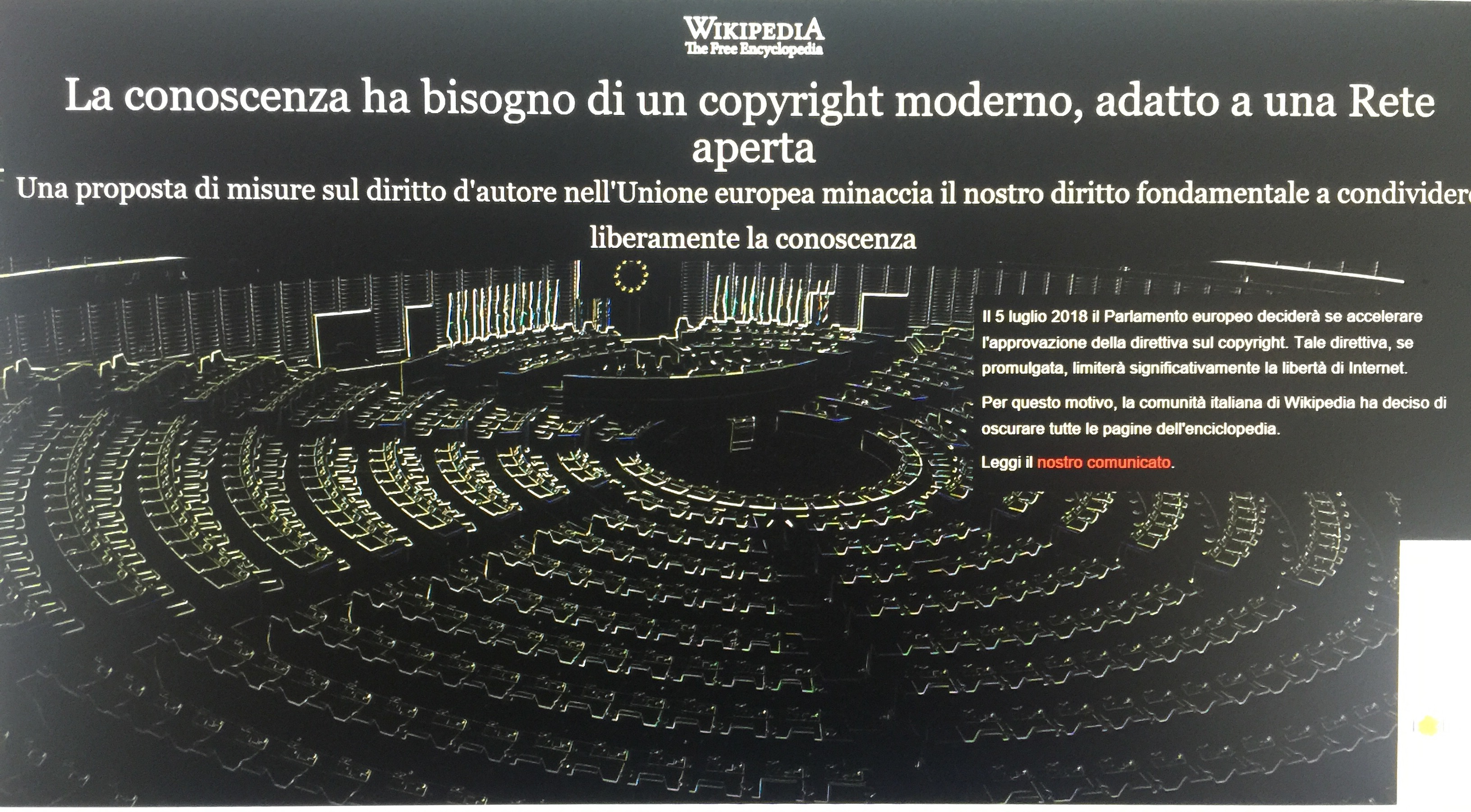 Wikipedia e' stata oscurata come protesta